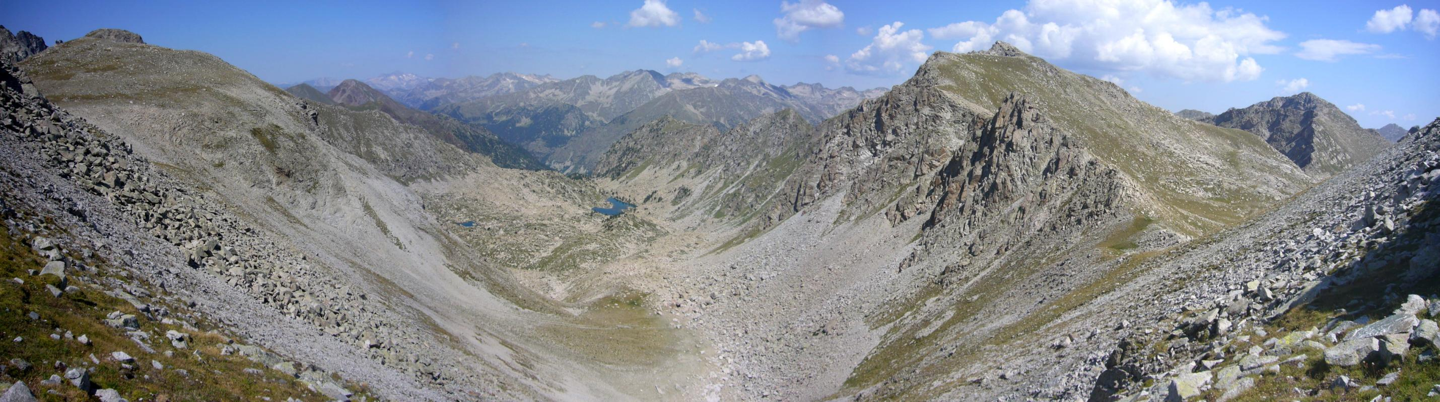 Vall de les Mussoles vista des del Pas Ample; la Vall de Boí, Alta Ribagorça, Catalunya